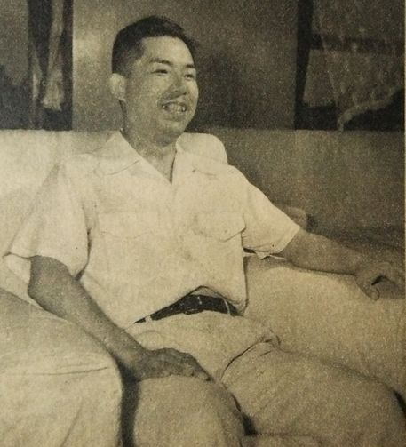 小堀清一